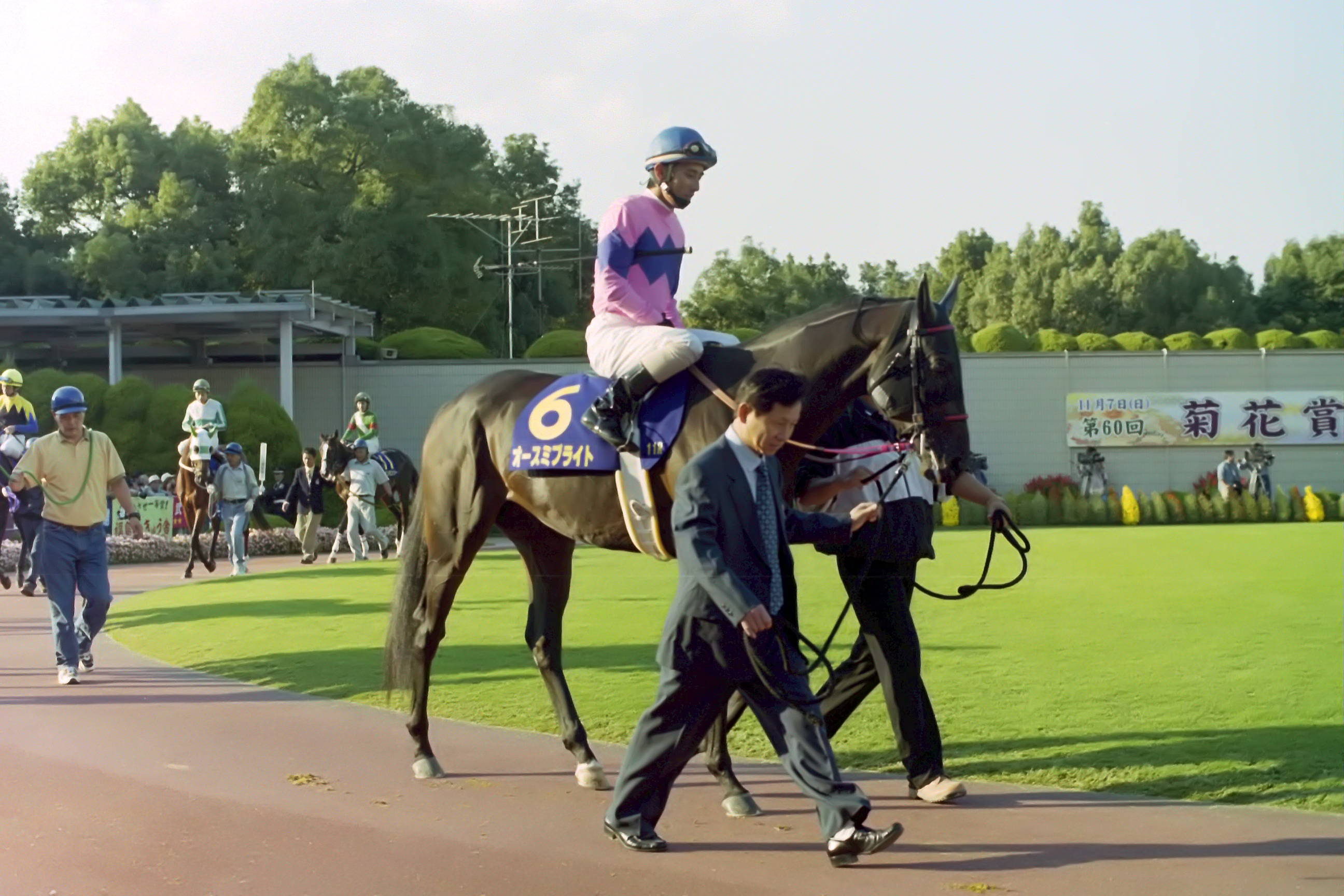 第60回菊花賞のパドックで、6番オースミブライト号と四位洋文騎手を撮影したもの。